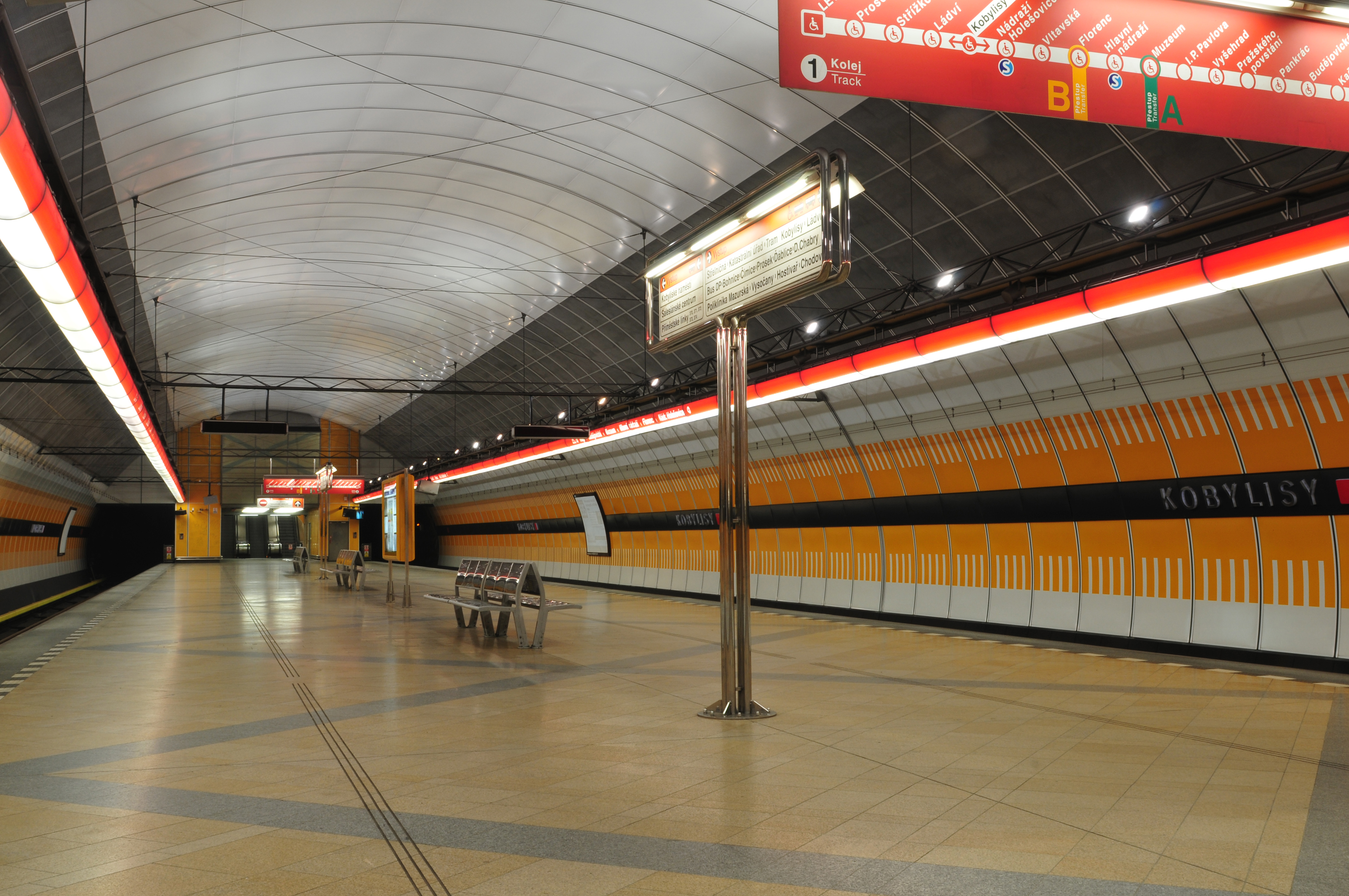 Metro Praha